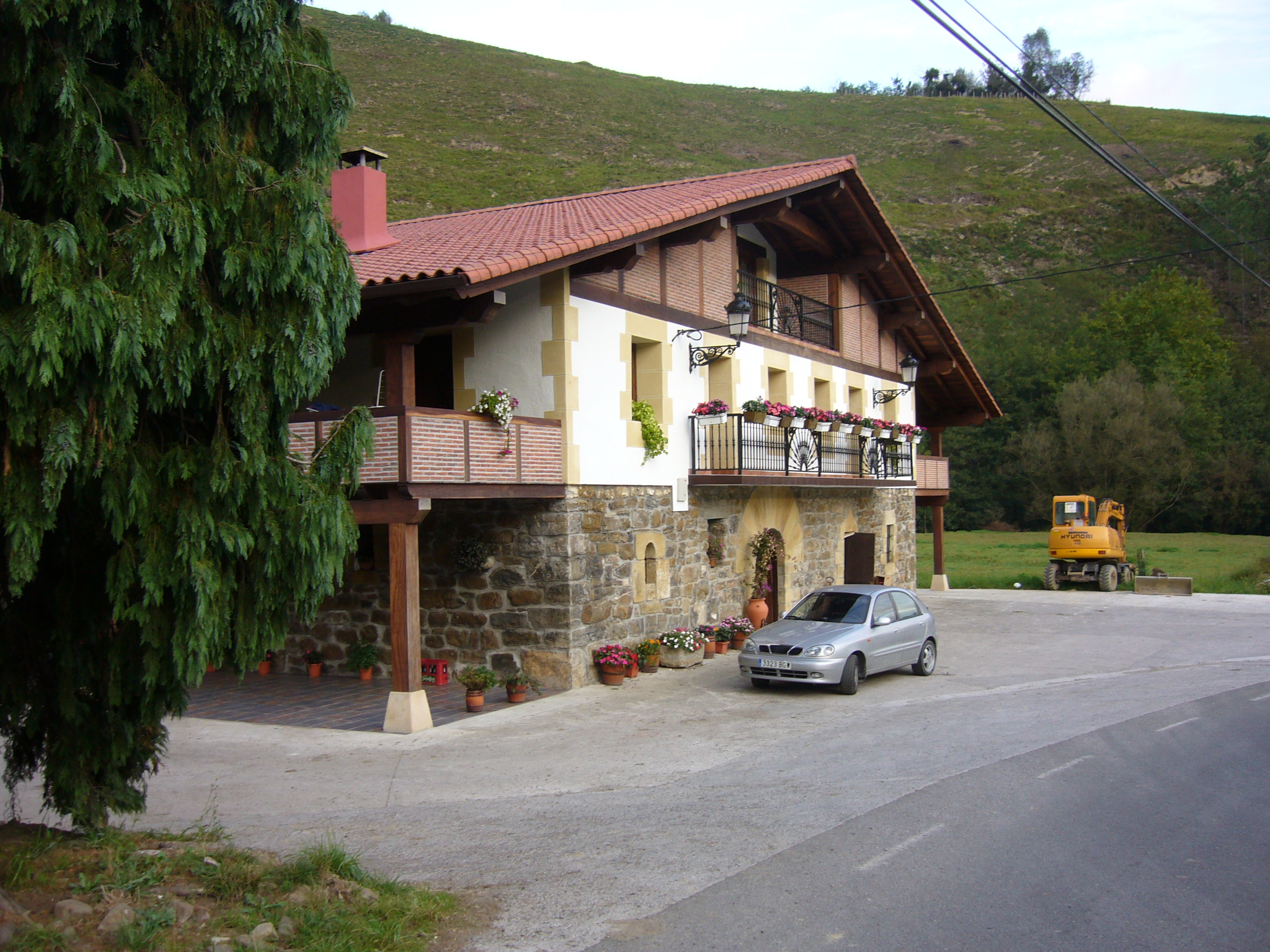 Mañarin Zelai etxeko fatxada